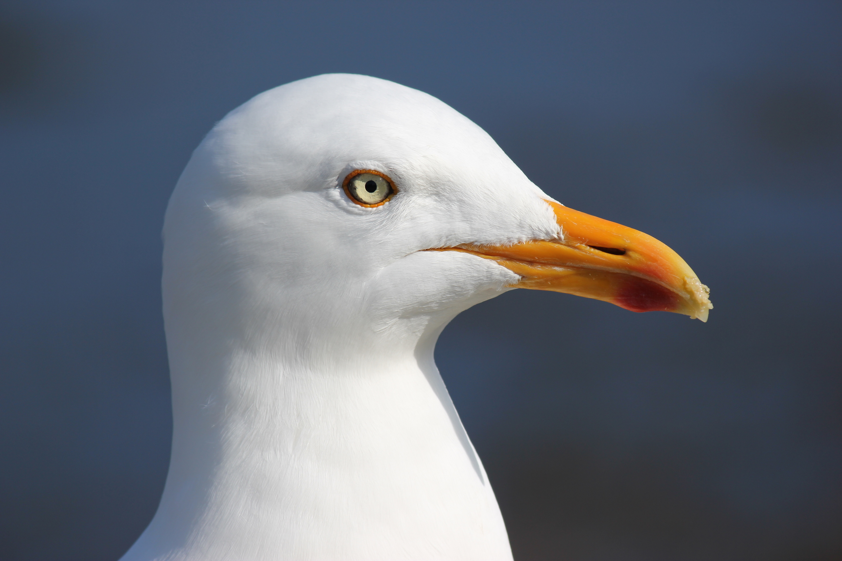 Eine Silbermöwe am Hafen von Inveraray, Schottland.